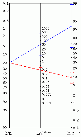 LR nomogram (P=20%, Sn=60%,Sp=98,8%)